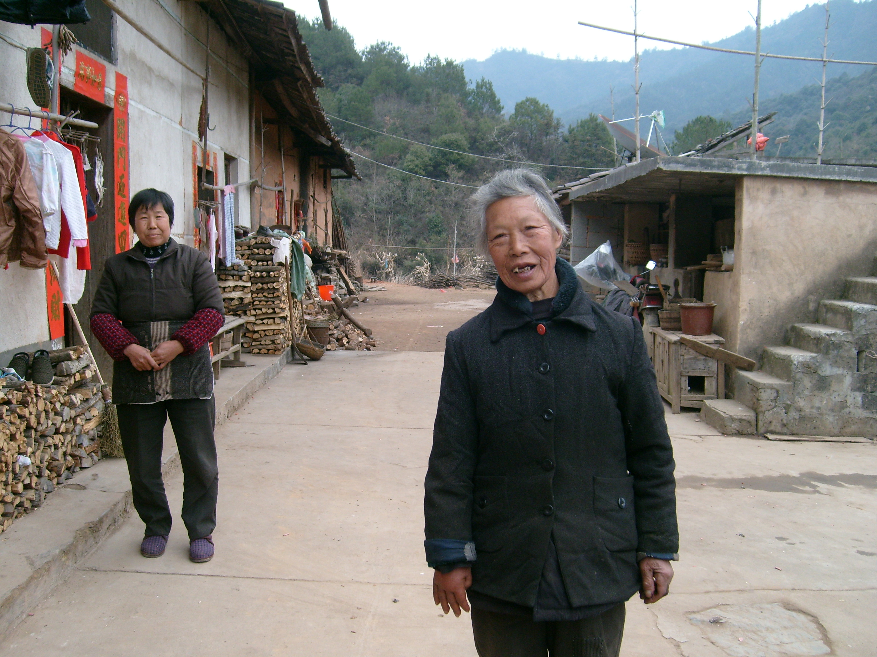 纯朴的景德镇乡村居民